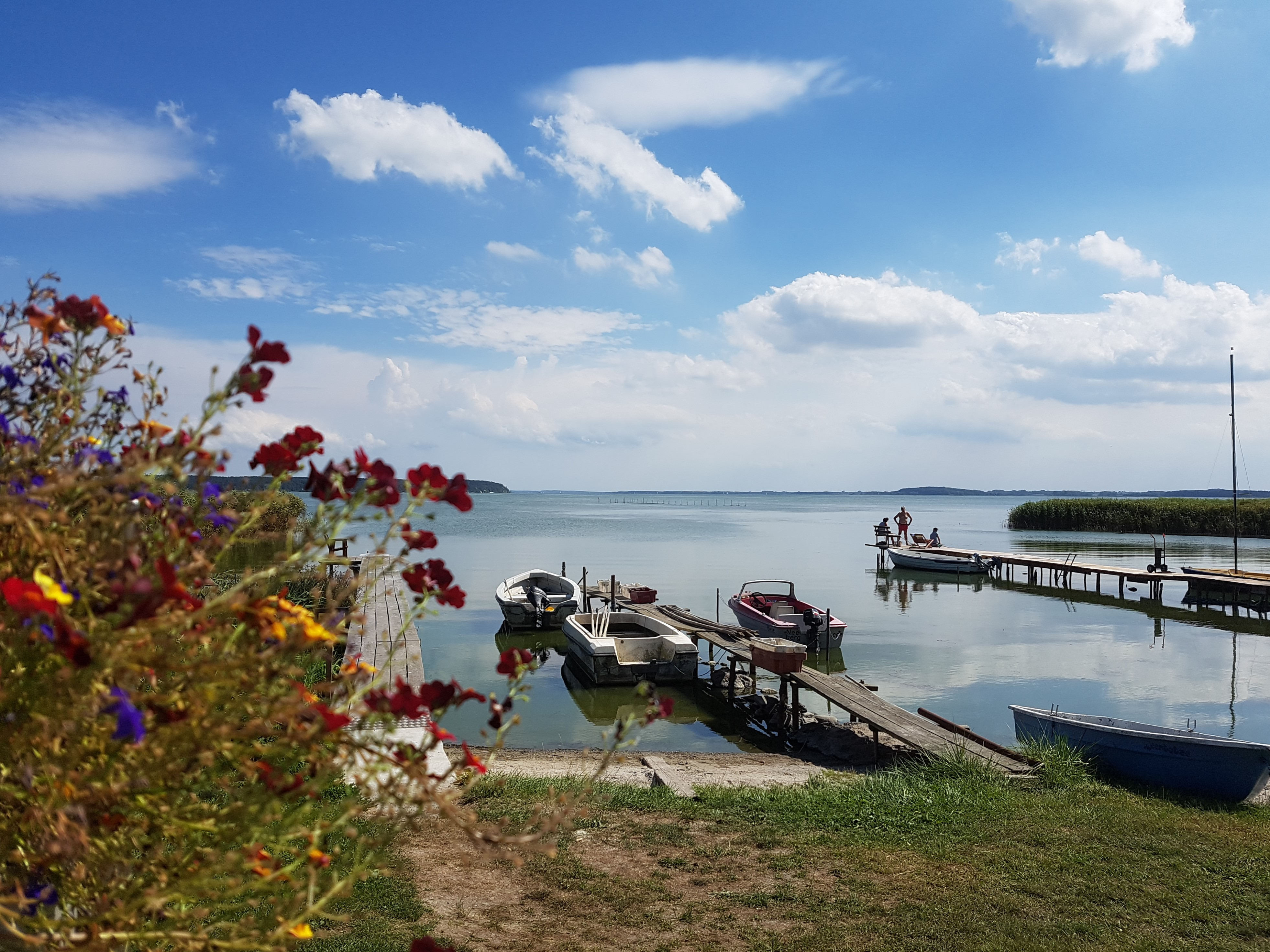 Marina Neeberg am Peenestrom